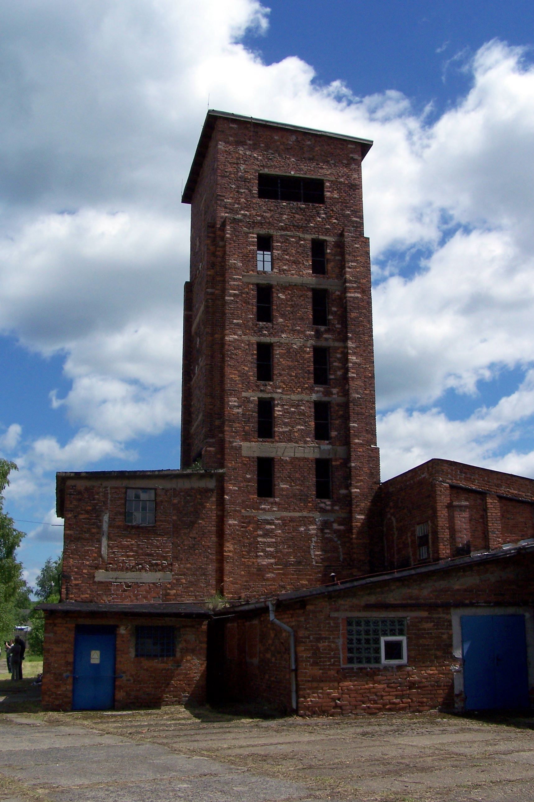 Věž smrti